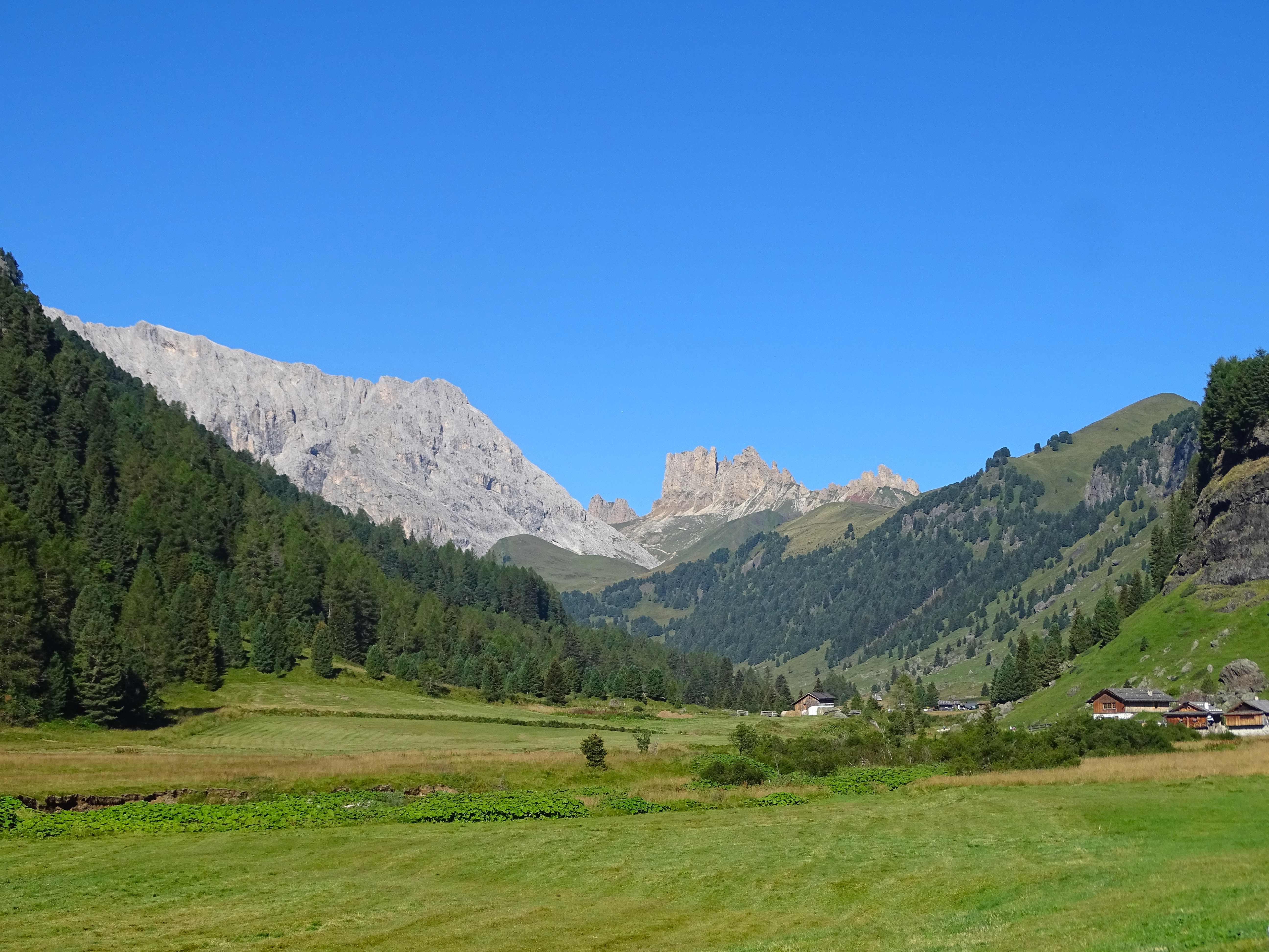 Val Duron